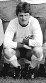 Title: Mannschaftsfoto der DDR-Fußball-Juniorenauswahl Factual corrections and alternative descriptions are encouraged separately from the original description. Additionally errors can be reported at this page to inform the Bundesarchiv. Original historic description: ADN-ZB-Kluge-3.5.80-Leipzig: Mannschaftsbild der DDR-Juniorenauswahl 1980. Stehend v.l.: Trainer Hermann Bley, Rainer Ernst, Gerd Seifert, Peter Englisch, Ranian Holata, Carsten Sänger, Frank Rillich, Falko Götz, Lars Petzold, Trainer Werner Basel. Hockend v.l.: Bernd Nemetscheck, Lutz Radtke, Andreas Rath, Thomas Michaelowski, Markus Henkel, Andreas Zachhuber, Uwe Bredow, Jochen Illert. Das XXXIII. UEFA-Juniorenturnier findet vom 16.-25.5.1980 in der DDR statt.